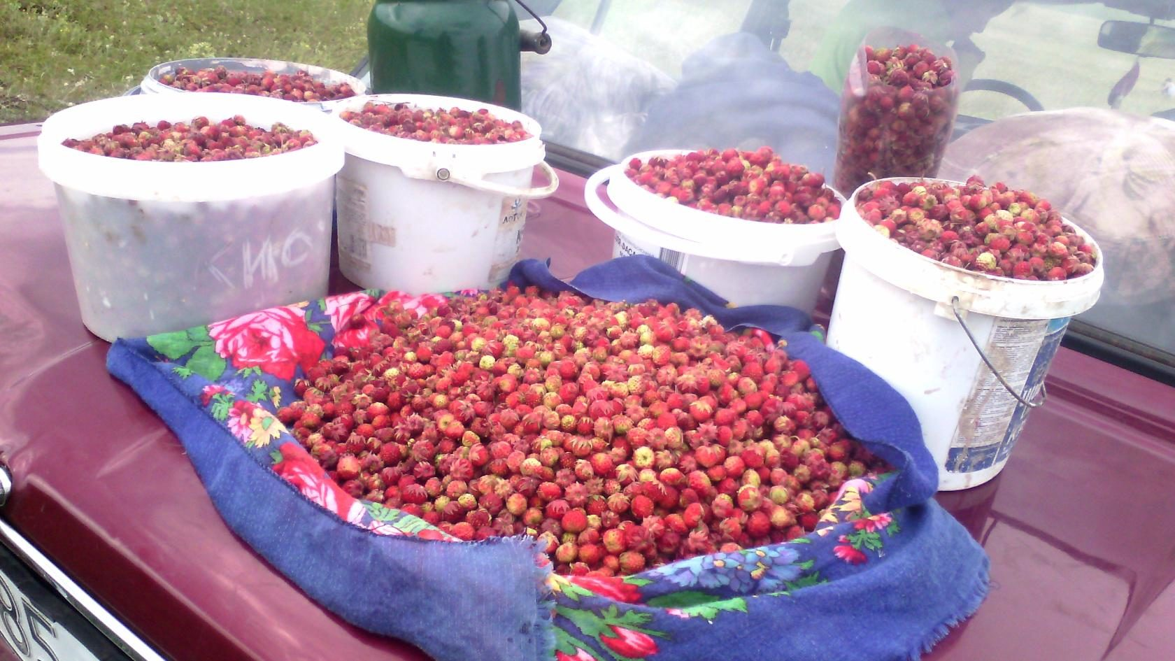 Клубника (Fragaria viridis), Россия, Челябинская область